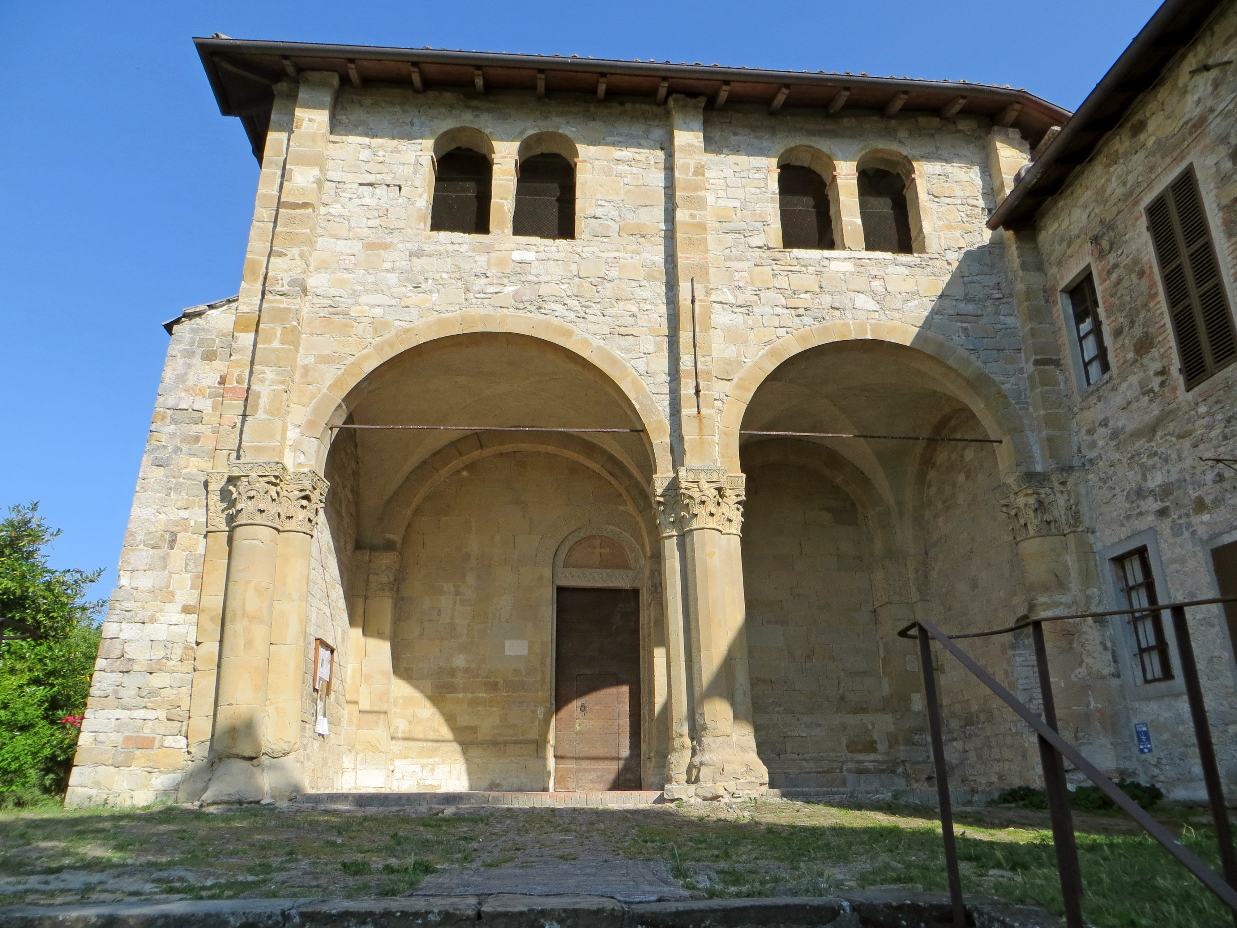 Abbazia di San Basilide (San Michele Cavana, Lesignano de' Bagni) - facciata della chiesa dei Santi Pietro e Paolo This is a photo of a monument which is part of cultural heritage of Italy.